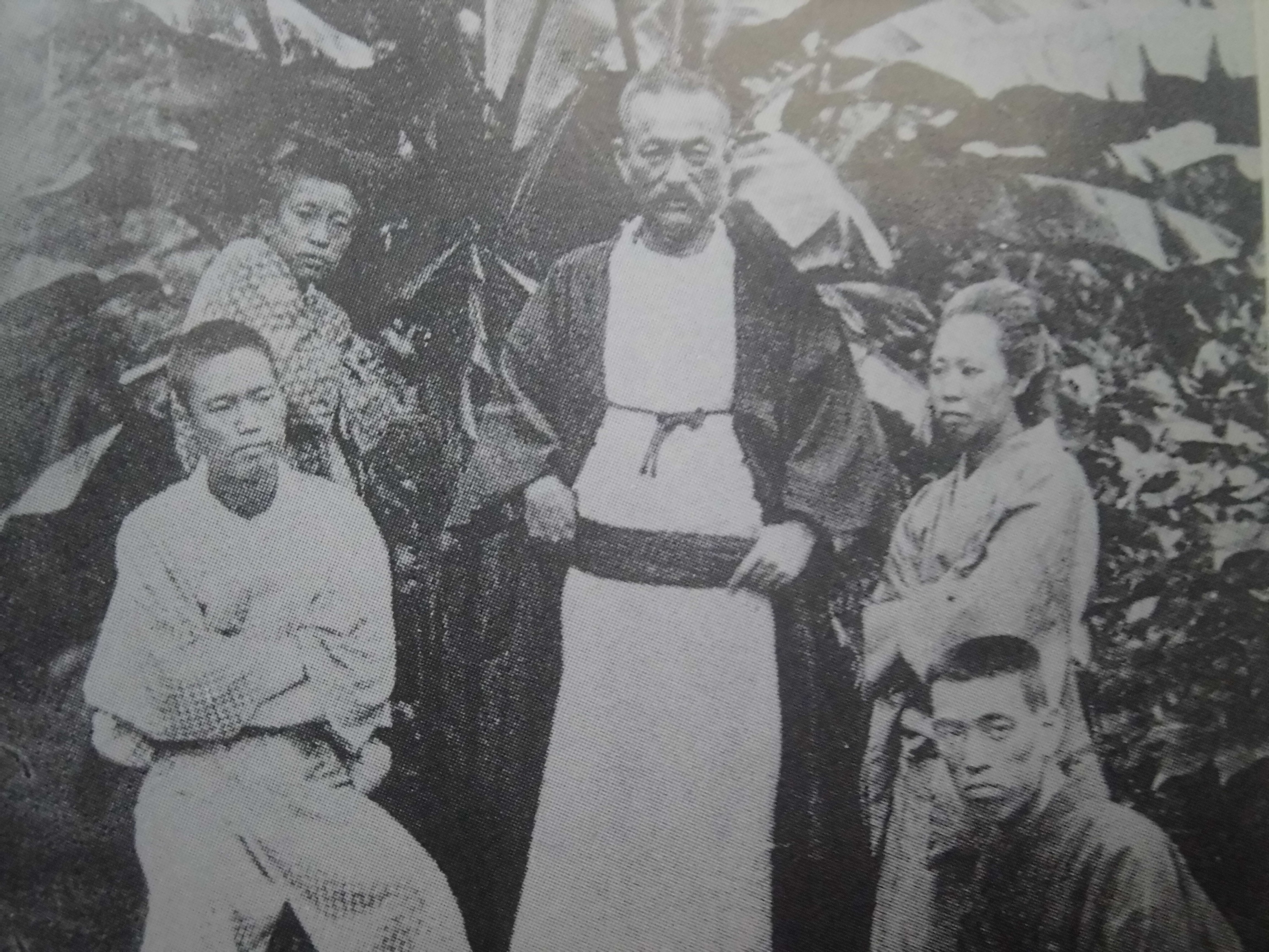 永井家の人々1